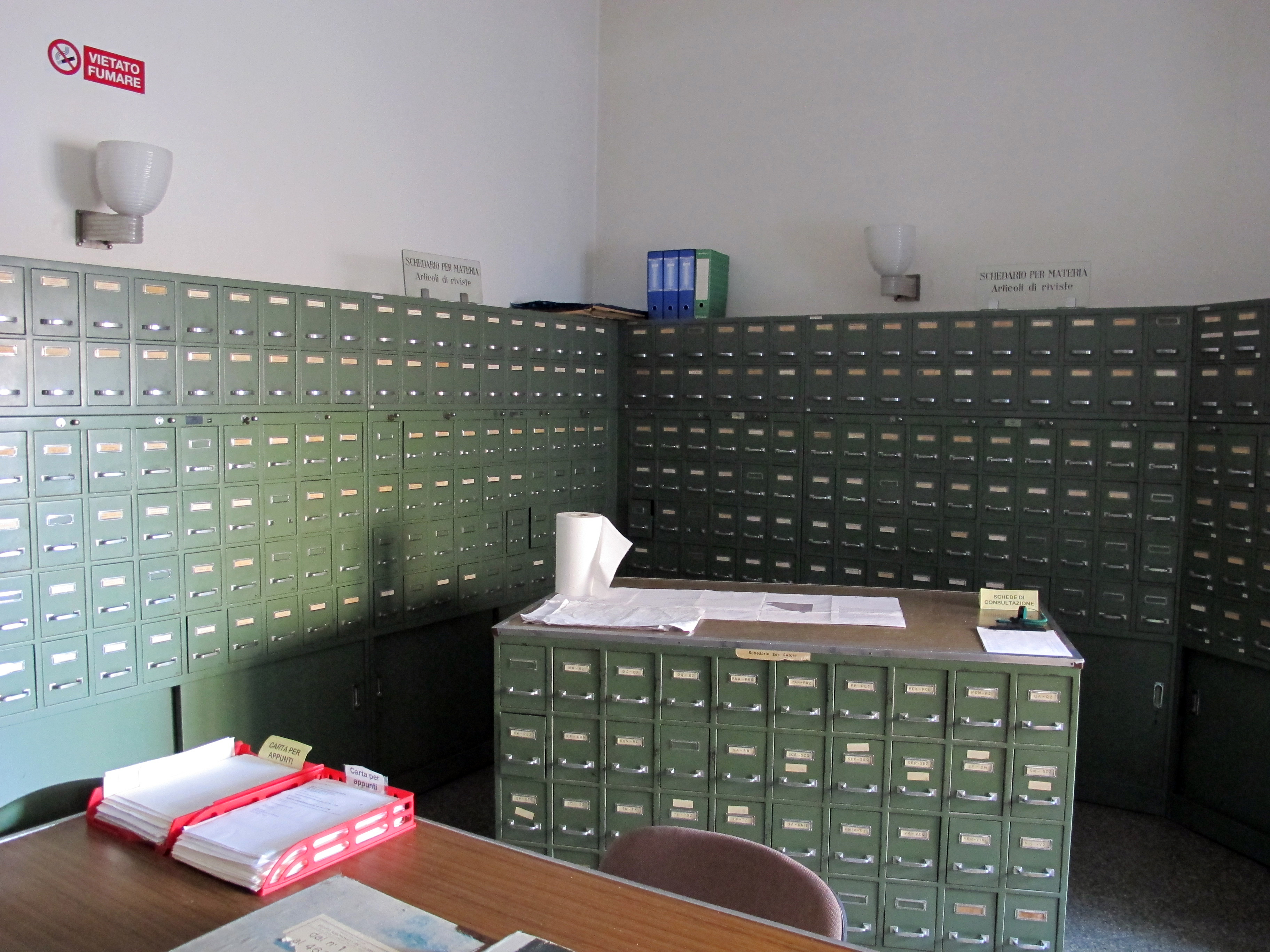 Istituto agronomico per l'oltremare, int., biblioteca, schedario